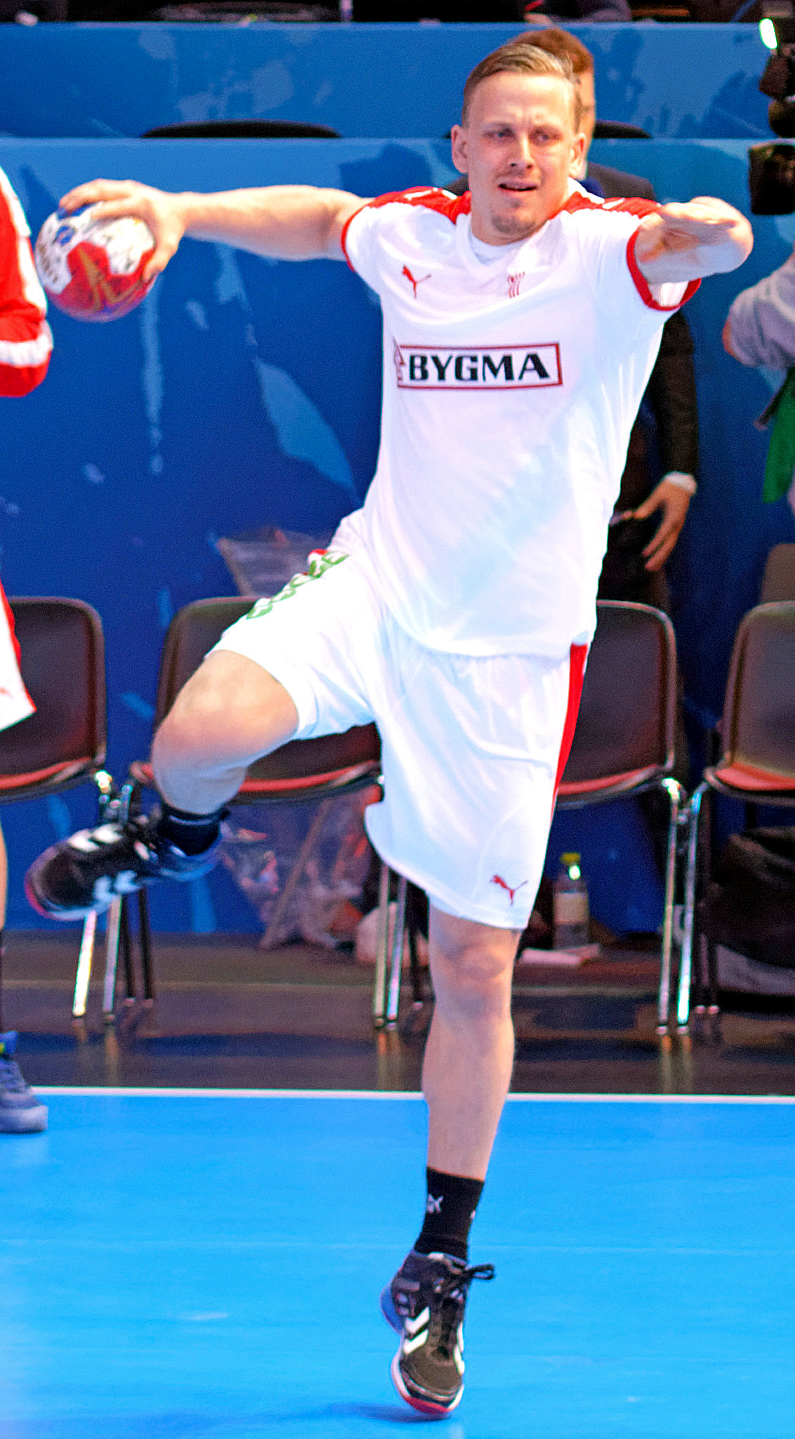 Match de la phase préliminaire du championnat du monde masculin de handball 2017 entre l'Egypte et le Danemark (Groupe D). A Bercy, le 14 janvier 2017.